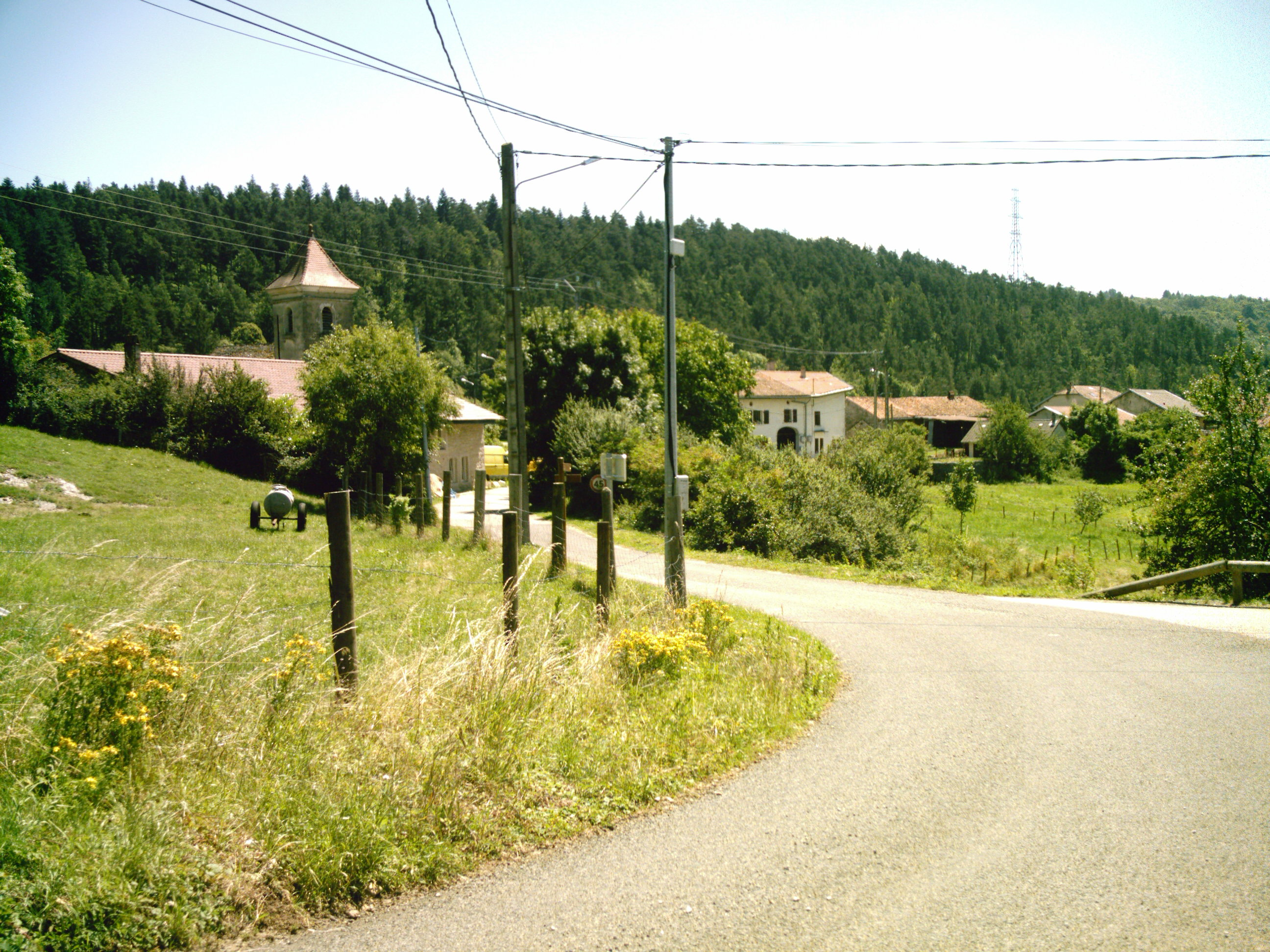 Vue général du Hameau Napt (Sonthonnax-la-Montagne)